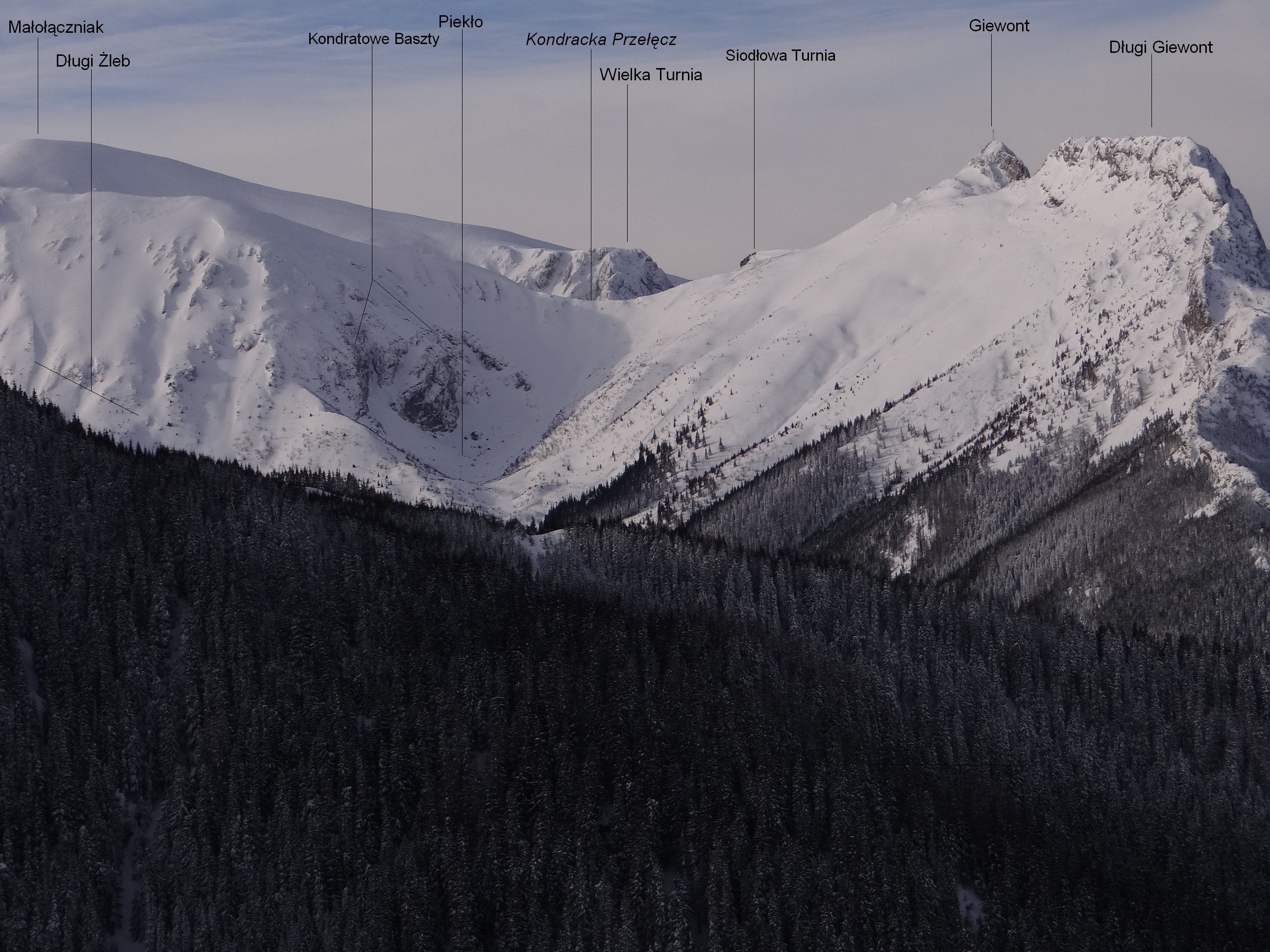 Widok z okolic Piekiełka